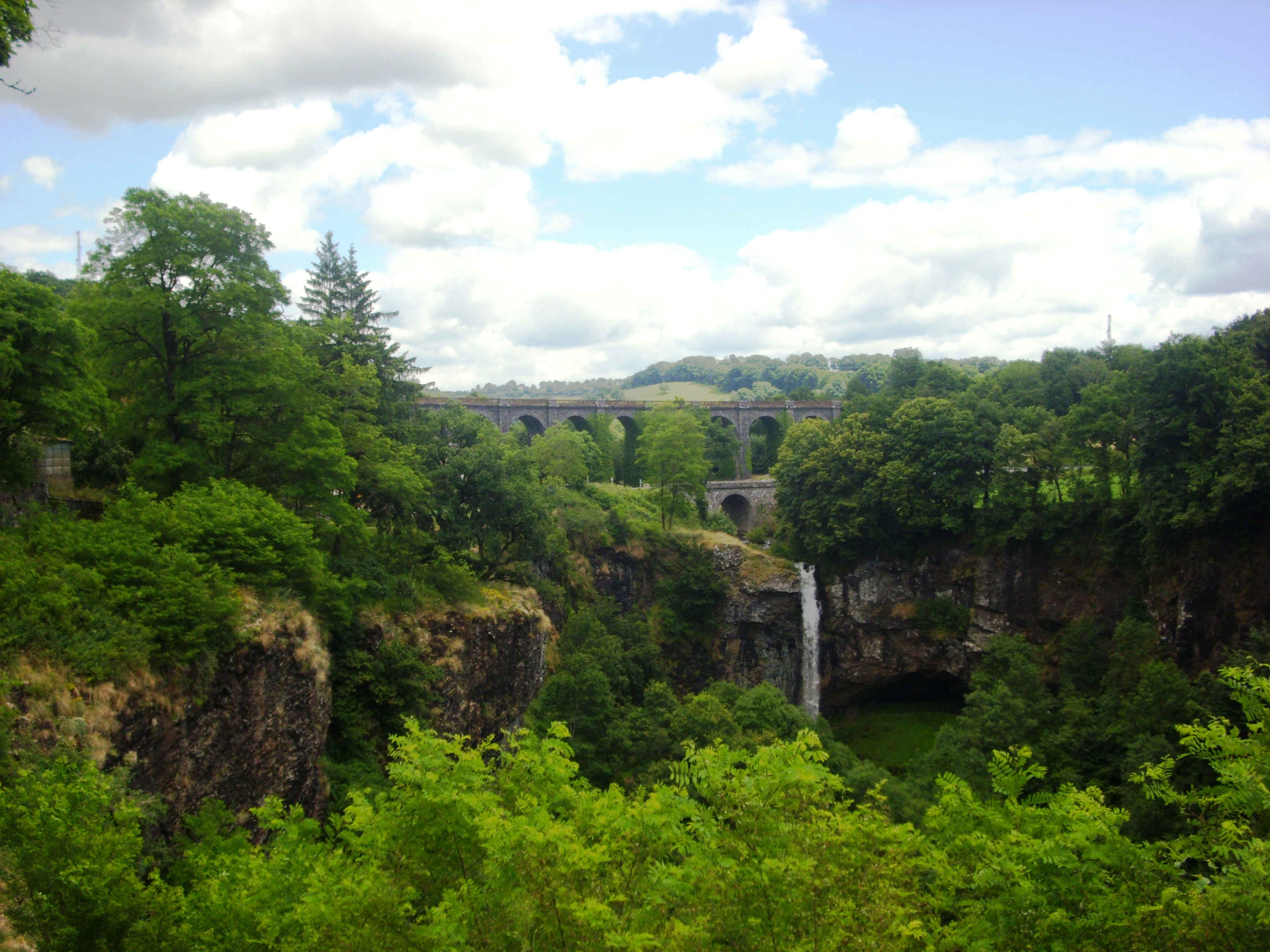 LA CHUTE DE L'AUZE DANS SON CADRE NATUREL